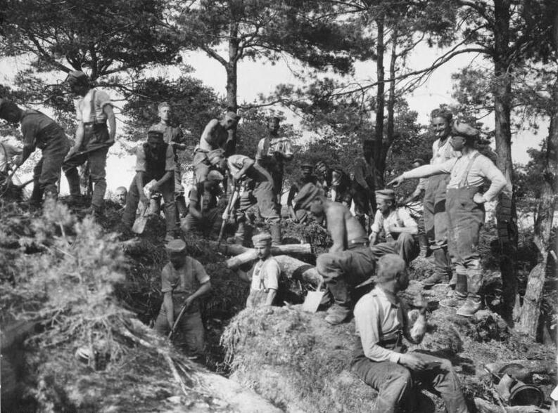 Pioniere beim Bau neuer Stellungen im Argonnerwald. 1916 Information added by Wikimedia users.